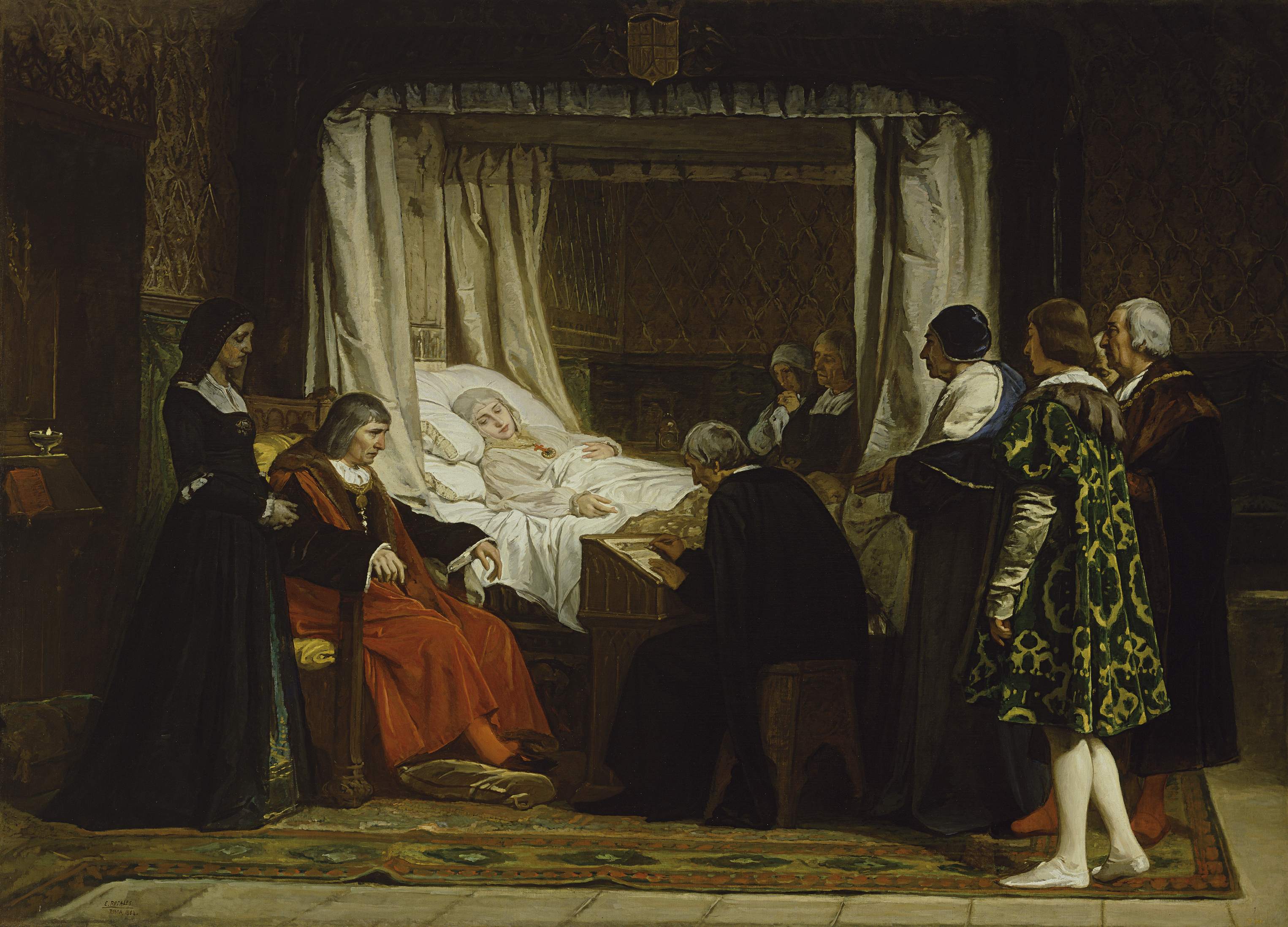 El lienzo representa a la reina Isabel I de Castilla, que falleció en Medina del Campo en 1504, dictando su testamento en presencia de su esposo, Fernando II de Aragón, y de otros personajes de la Corte castellana.